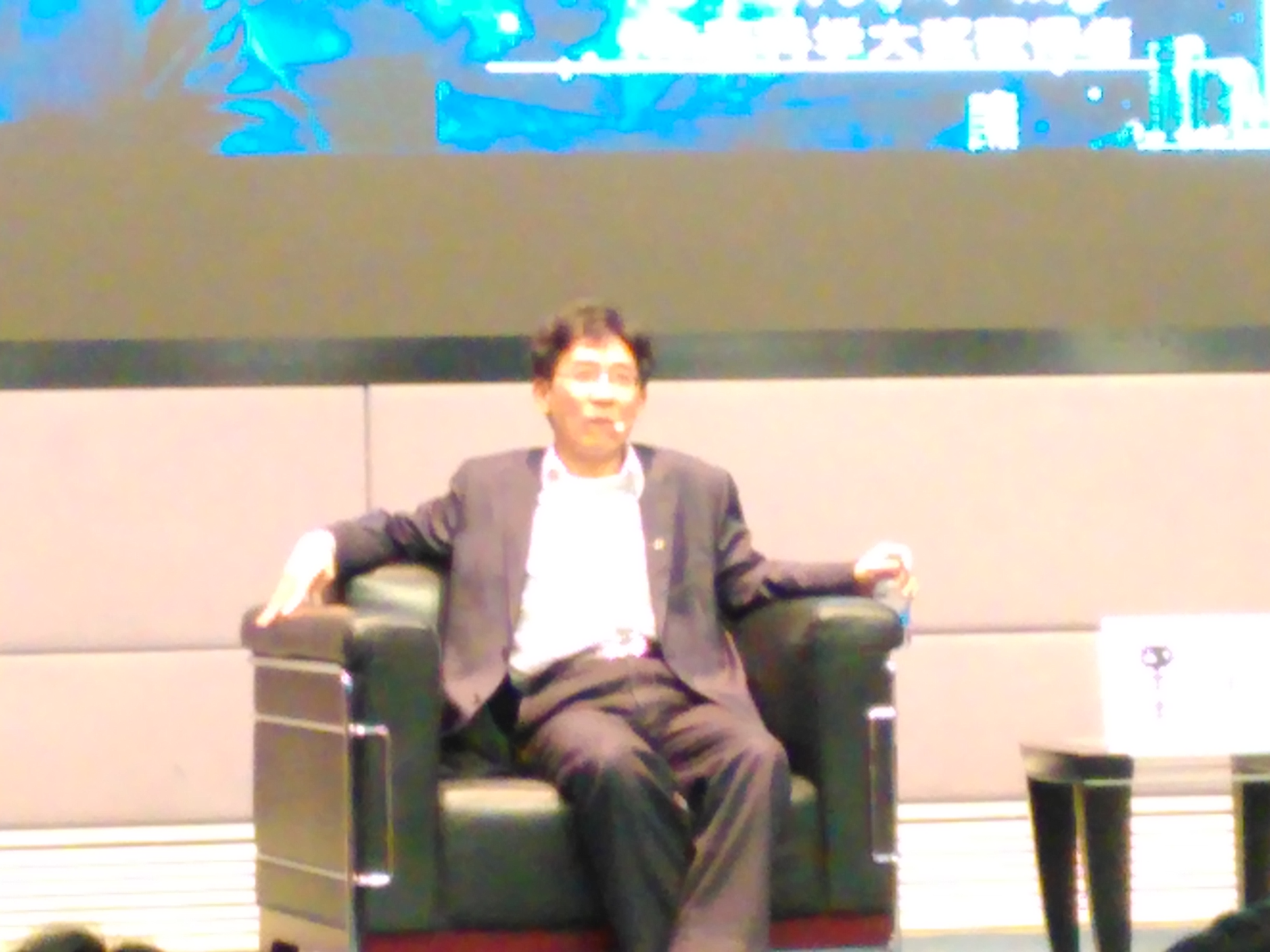 中文（中国大陆）: 薛其坤，摄于墨子沙龙讲座